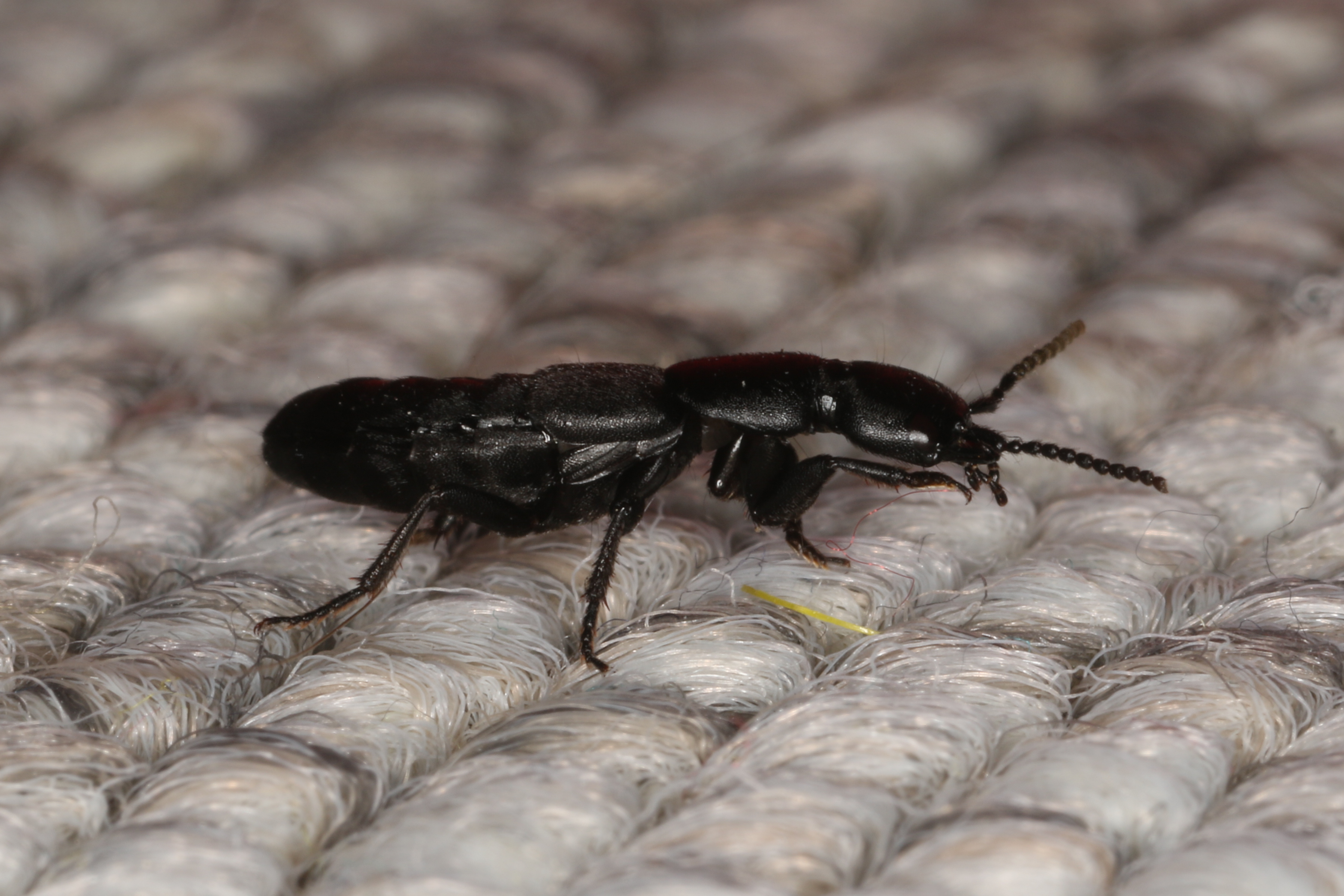 Ocypus nitens (Schrank, 1781), found under rock, Søborg, Denmark, 9 April 2016